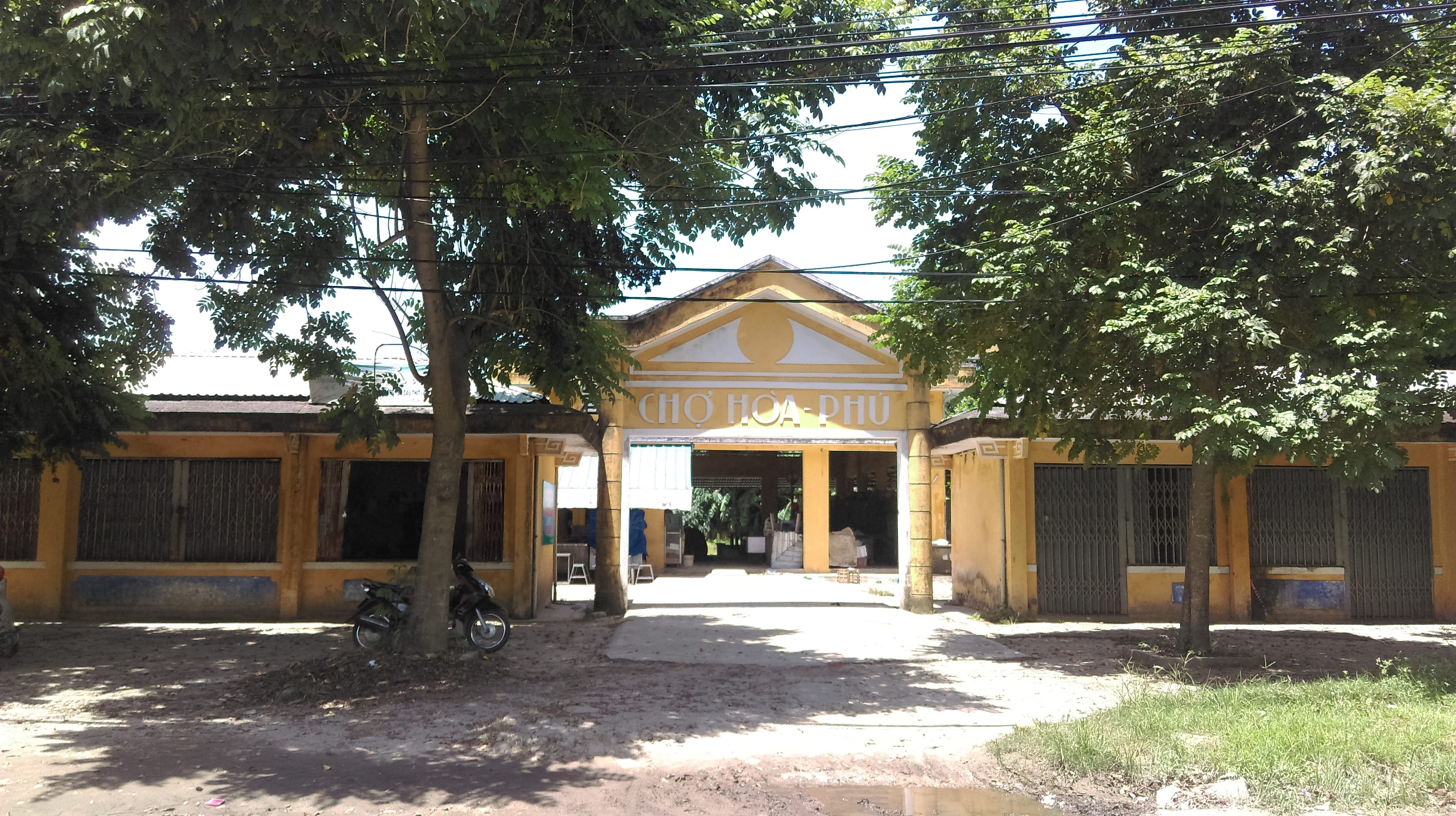 Chợ Hòa Phú, Hòa Vang, Đà Nẵng